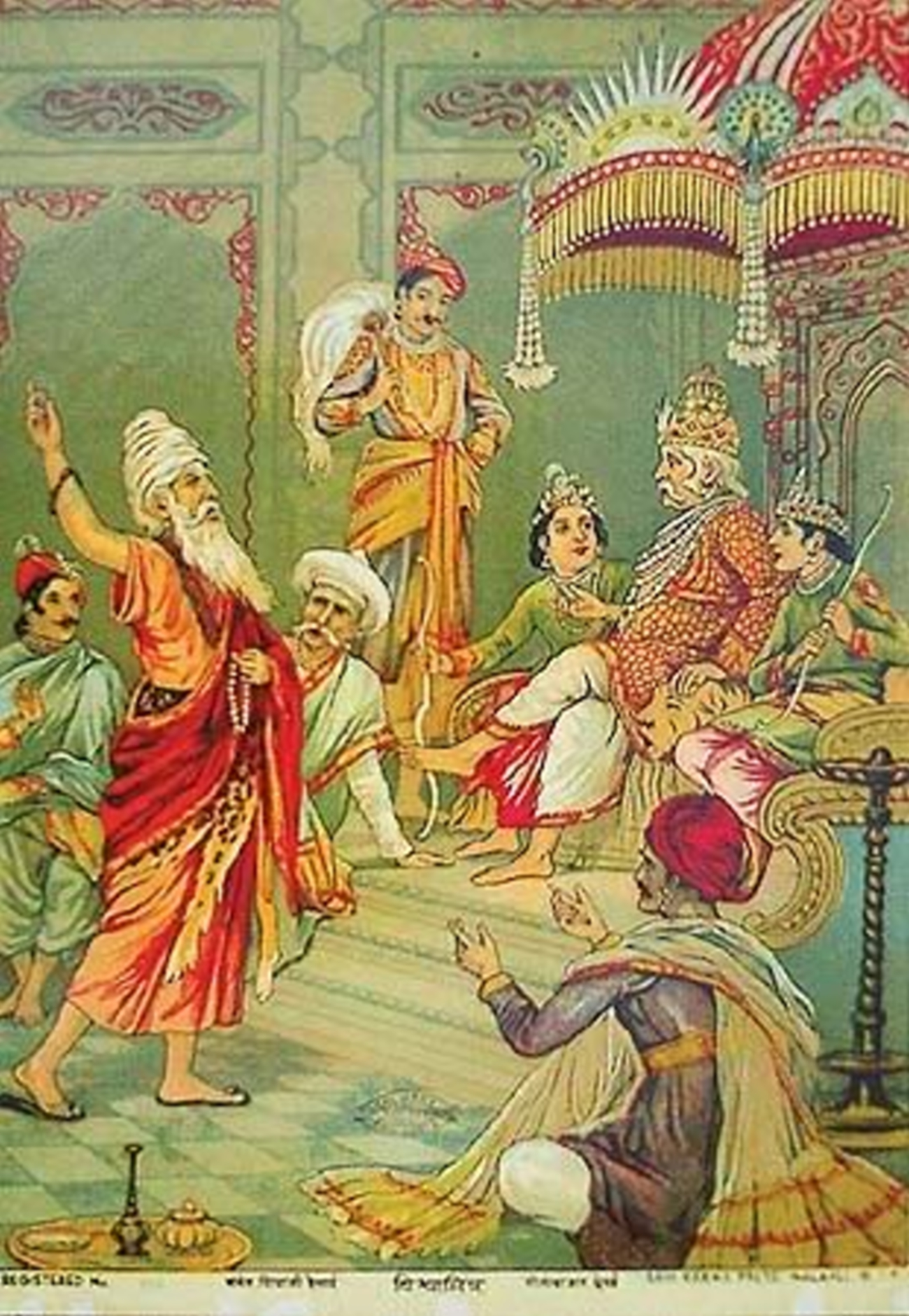 Abhimanyu Laxman Vadh